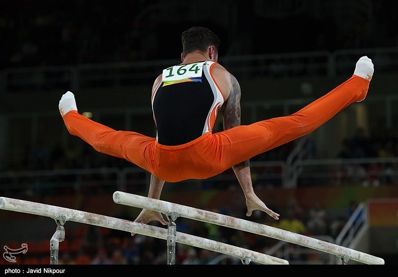 Gymnastics at the 2016 Summer Olympics